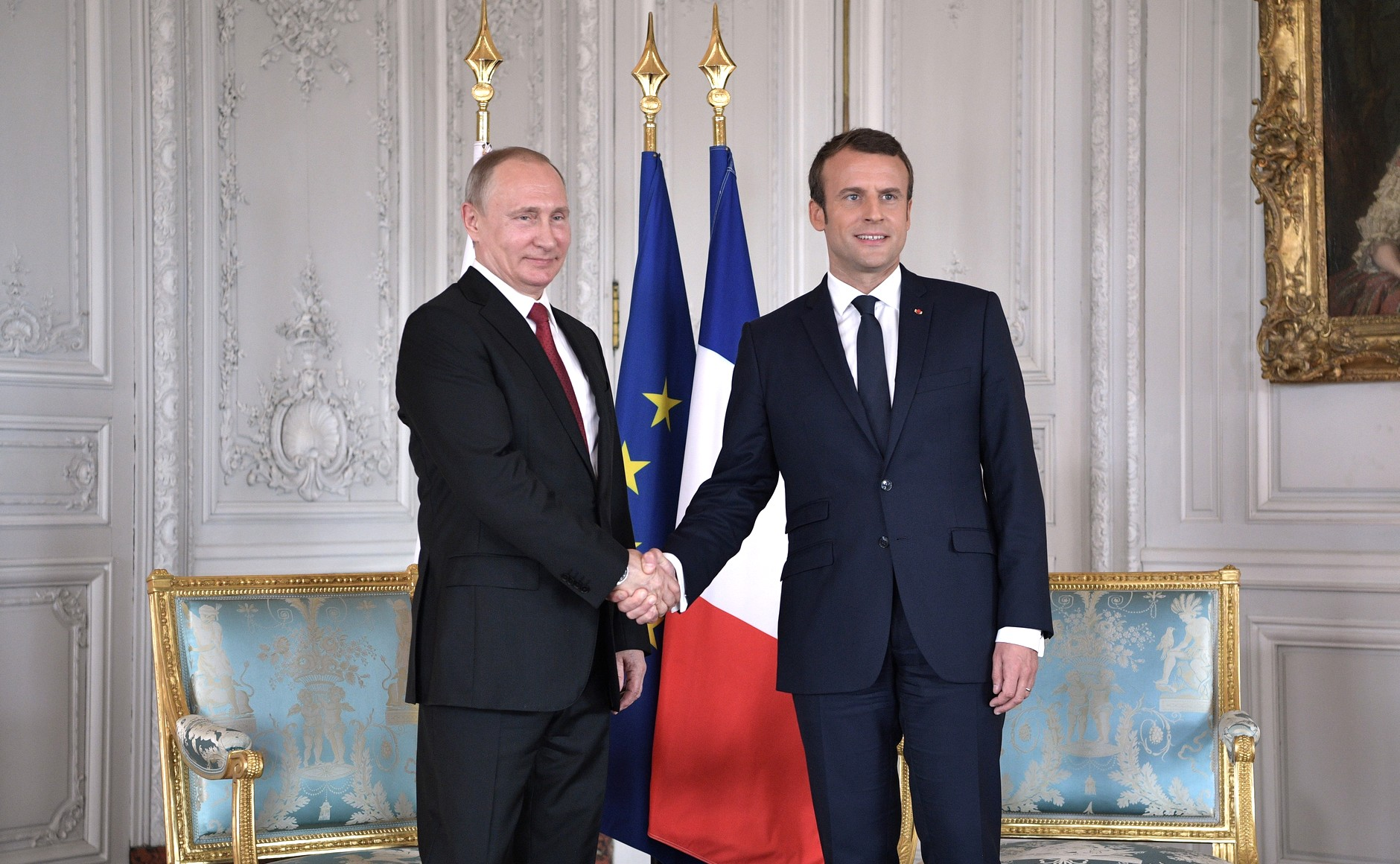 Президент России Владимир Путин с Президентом Франции Эммануэлем Макроном. Париж. Версаль